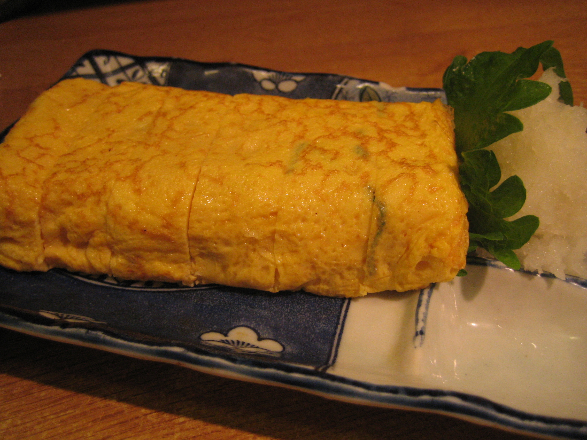 Japanese omeletteTamago Yaki